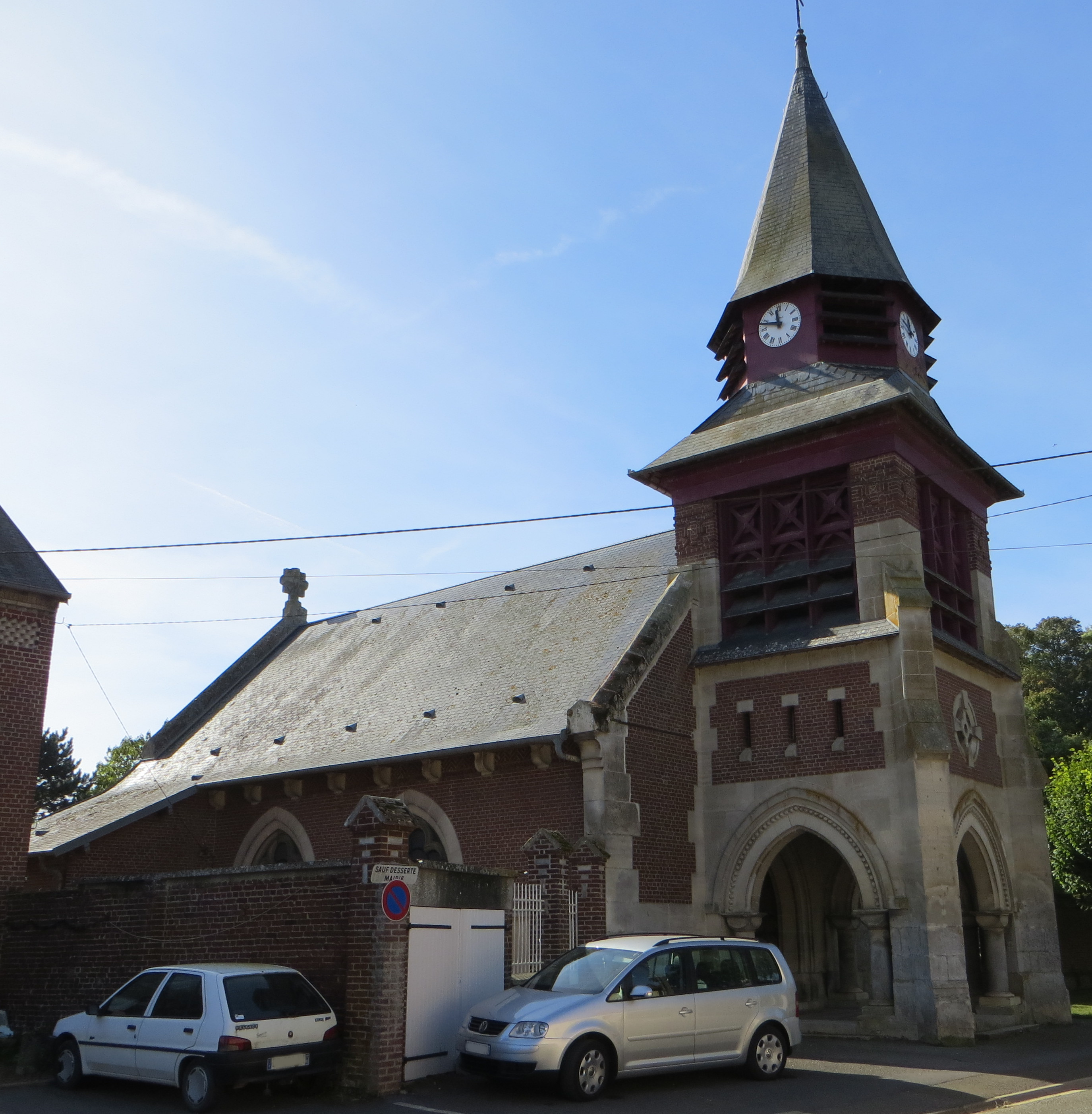 Vue générale de l'église